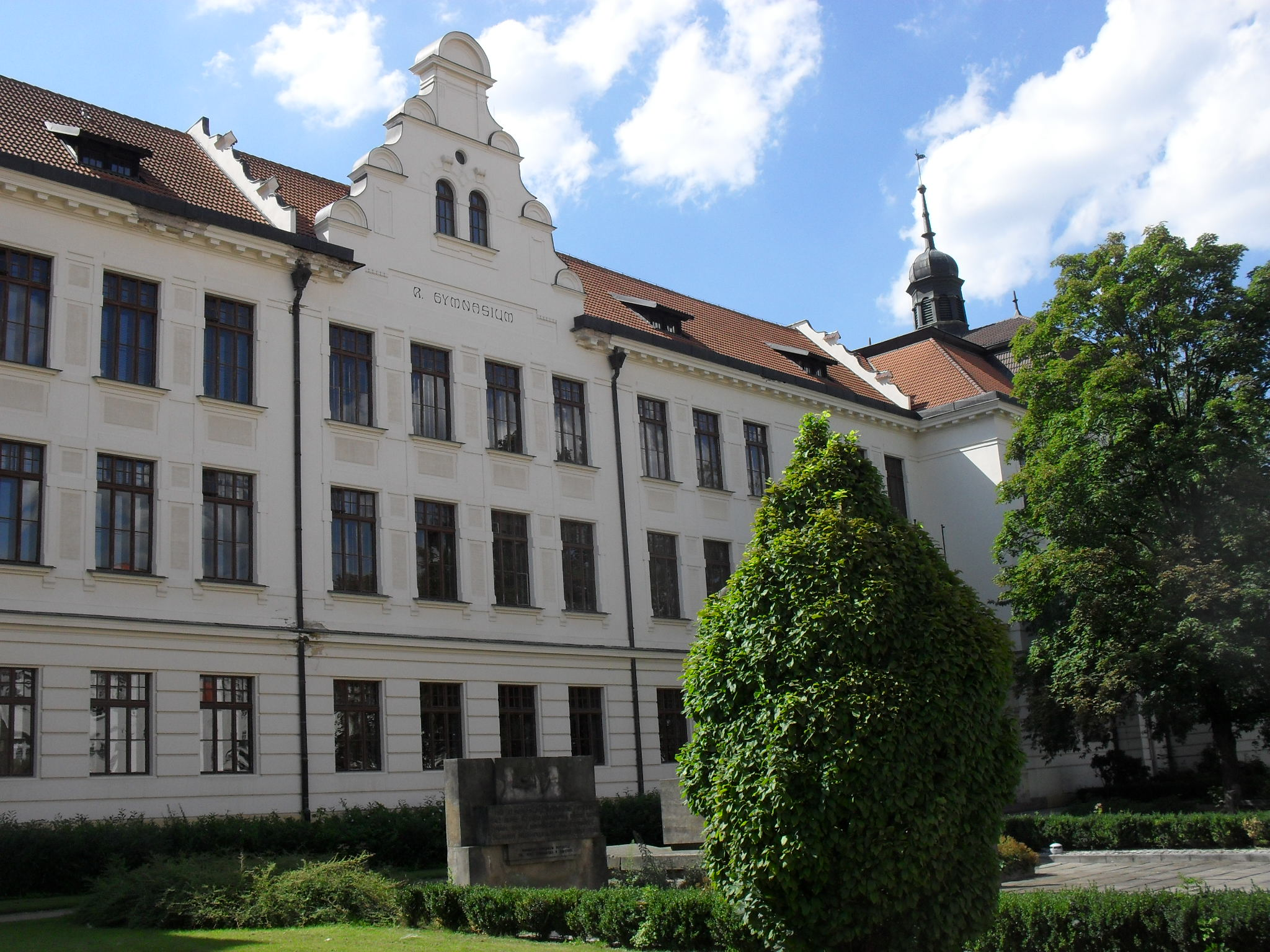 Budova gymnázia Benešov